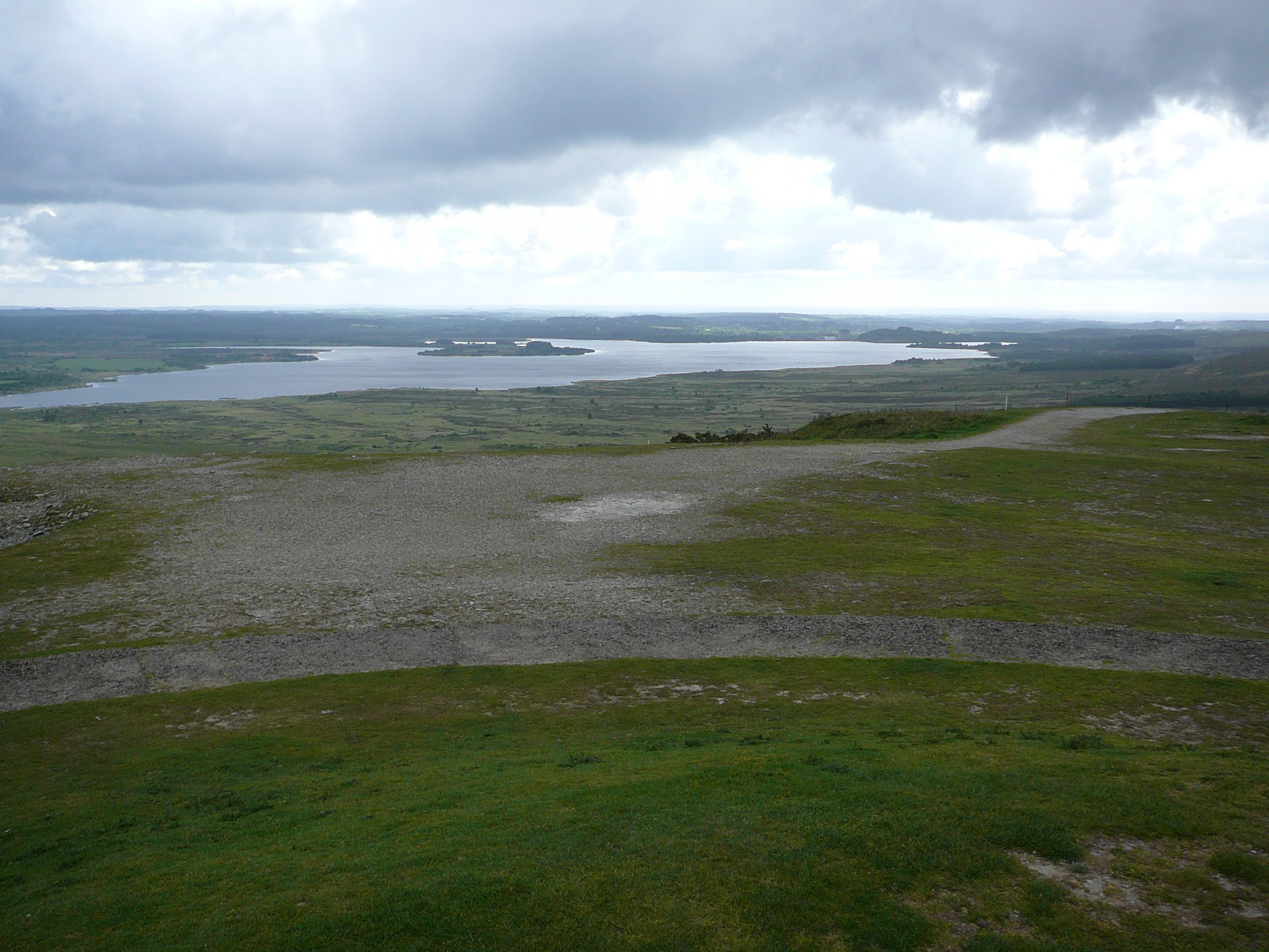 Le lac réservoir Saint-Michel et le marais du Yeun Elez vus du sommet du mont Saint-Michel de Brasparts.